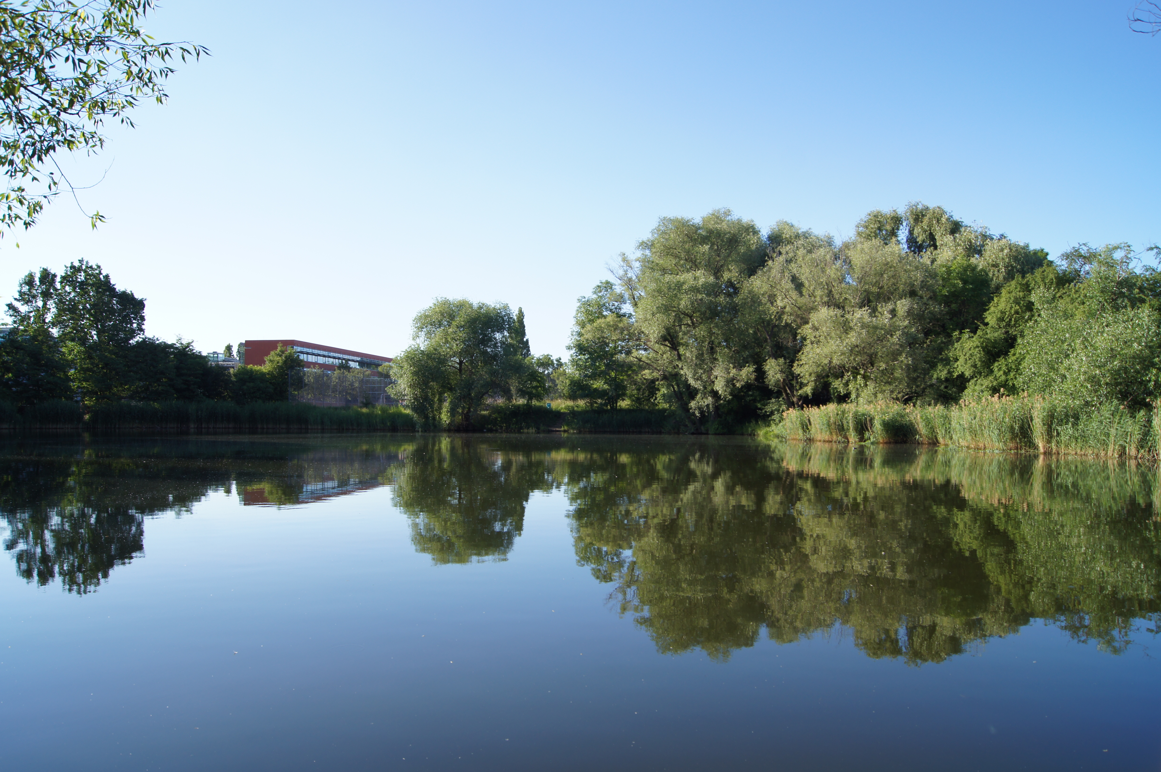 Schwänchenteich Frankfurt (Oder), Deutschland